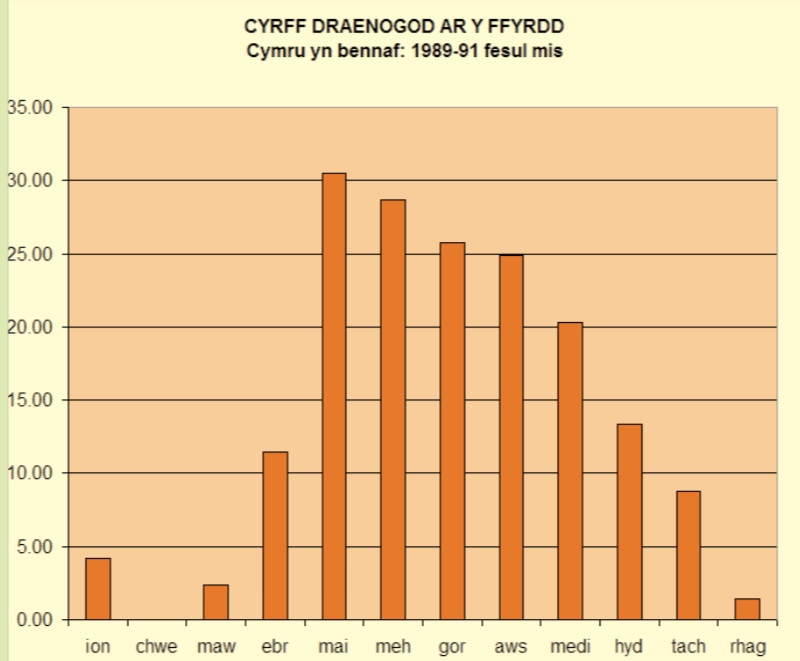 Graff: nifer cyfartalog (per 1000 milltir) cyrff draenogod pob mis ar y ffyrdd yng Nghymru 1989-91